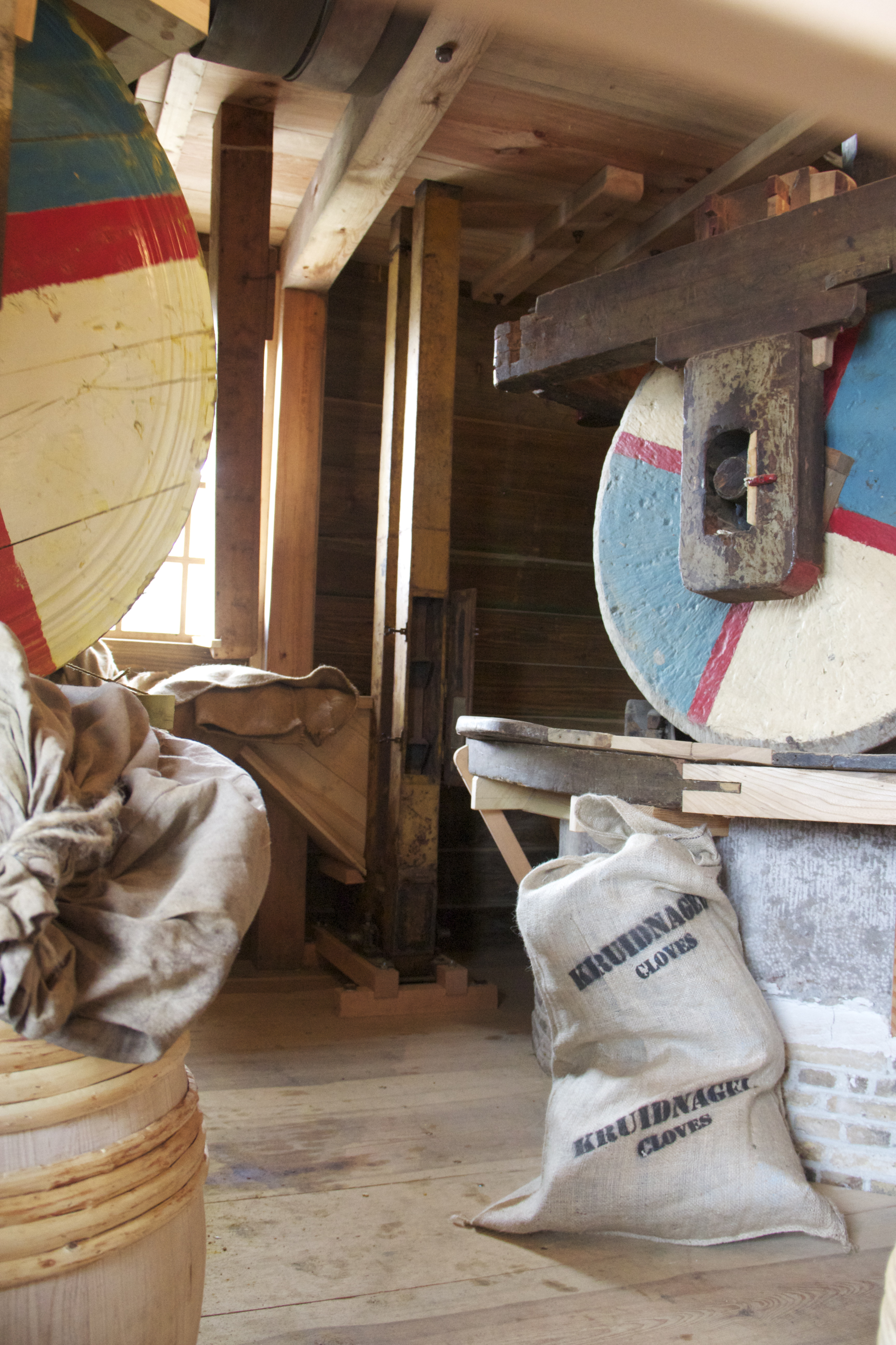 kantstenen in molen de huisman